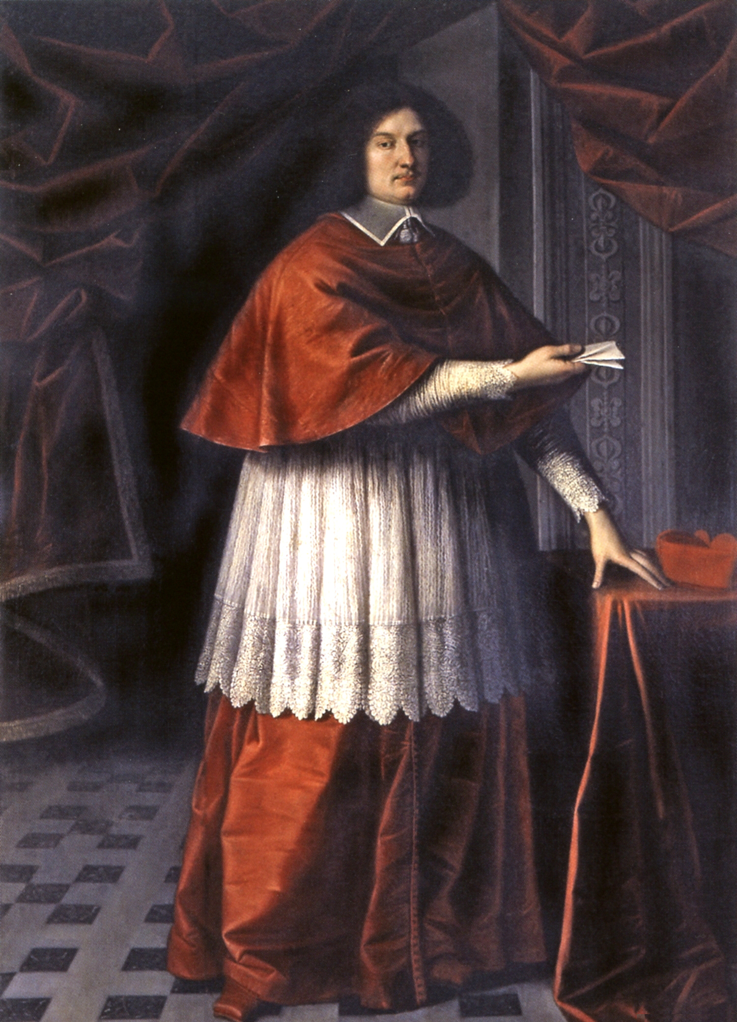 Porträt des Kardinals Francesco Maria Farnese (1619-1647)